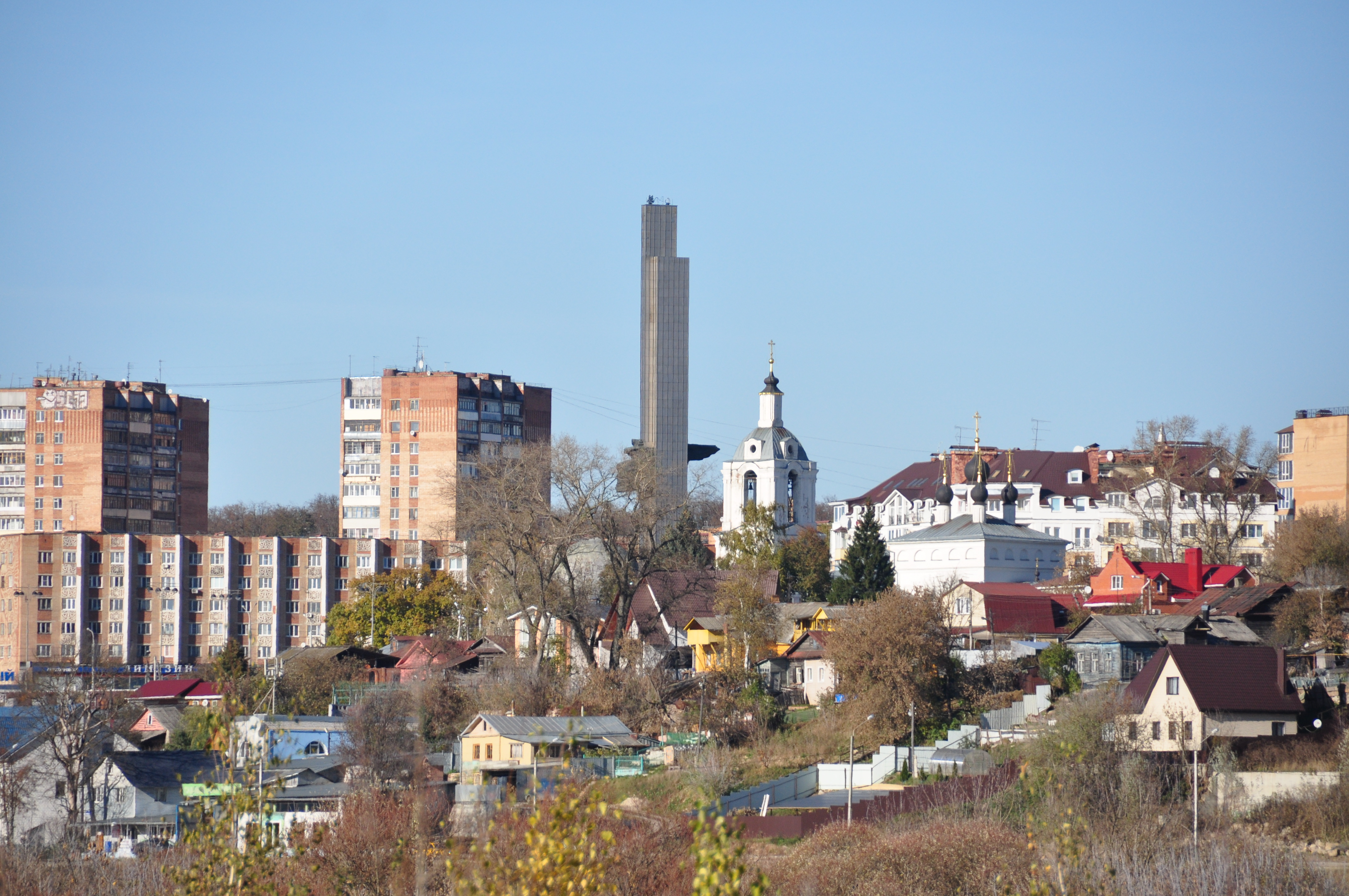 Kalouga - Калуга